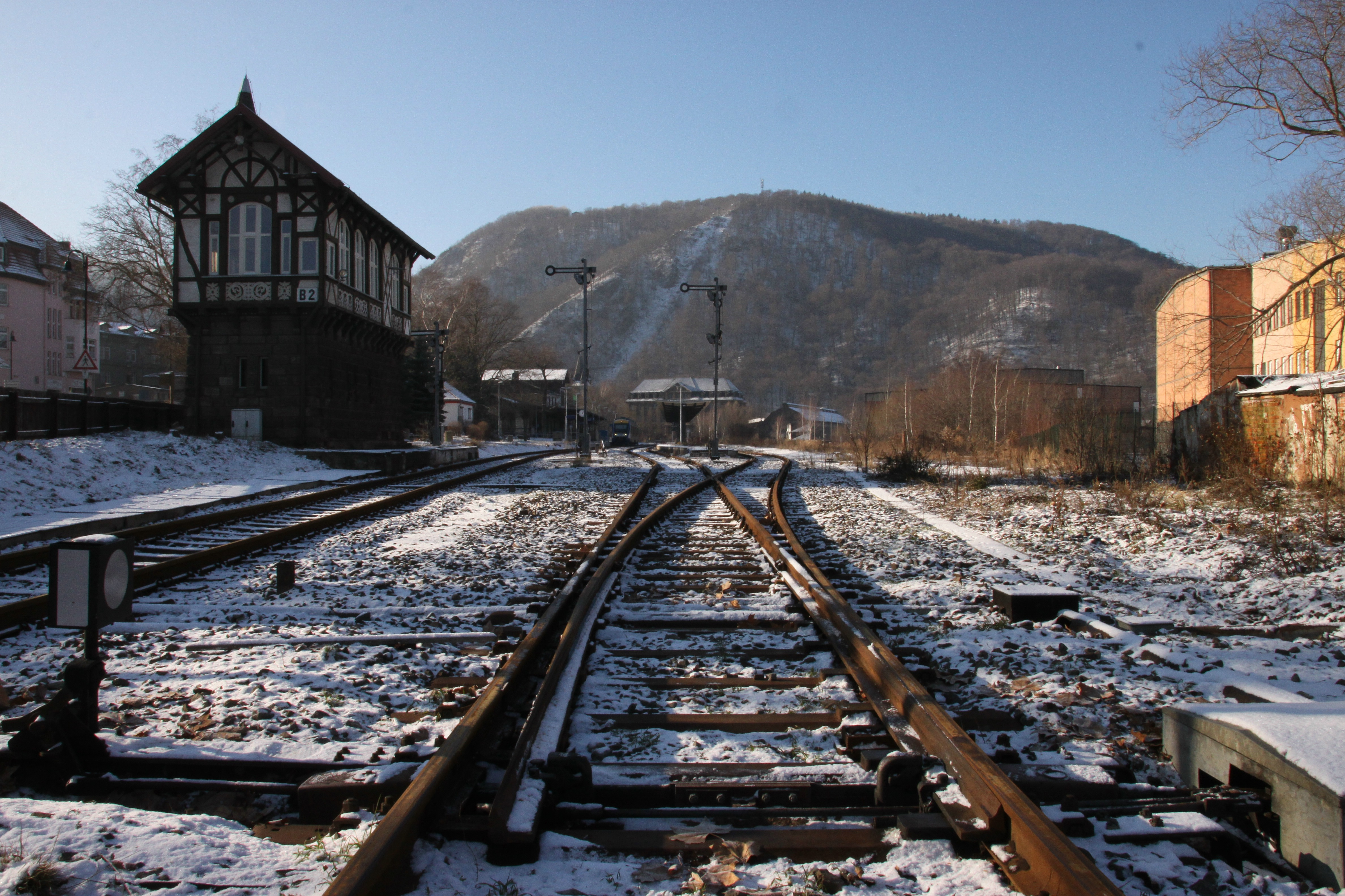 Bahnhof Thale